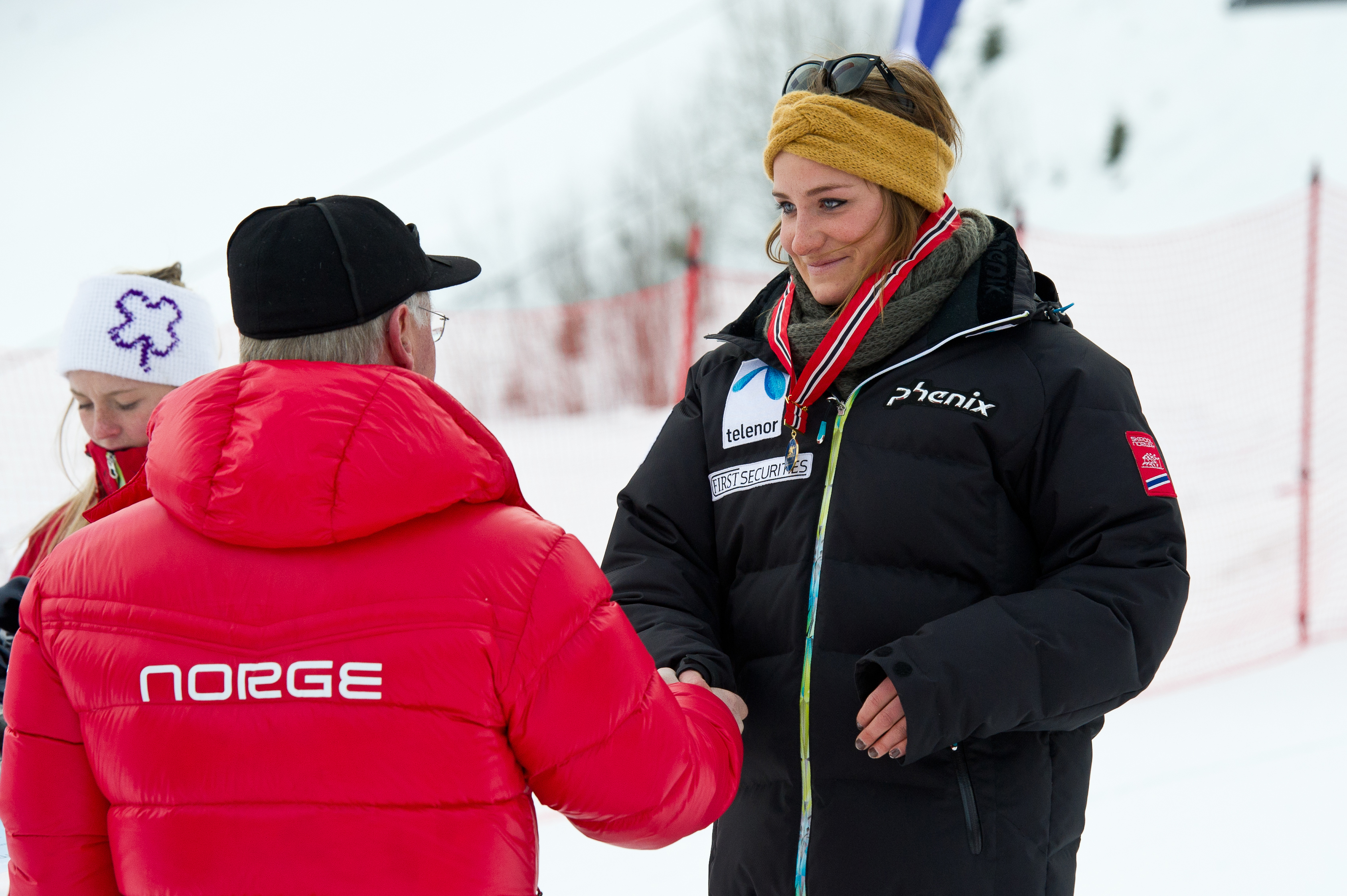 Lotte Smiseth Sejersted vant NM-gull i slalåm i Trysil, og gratuleres av skipresident Sverre K. Seeberg. Foto: Ola Matsson